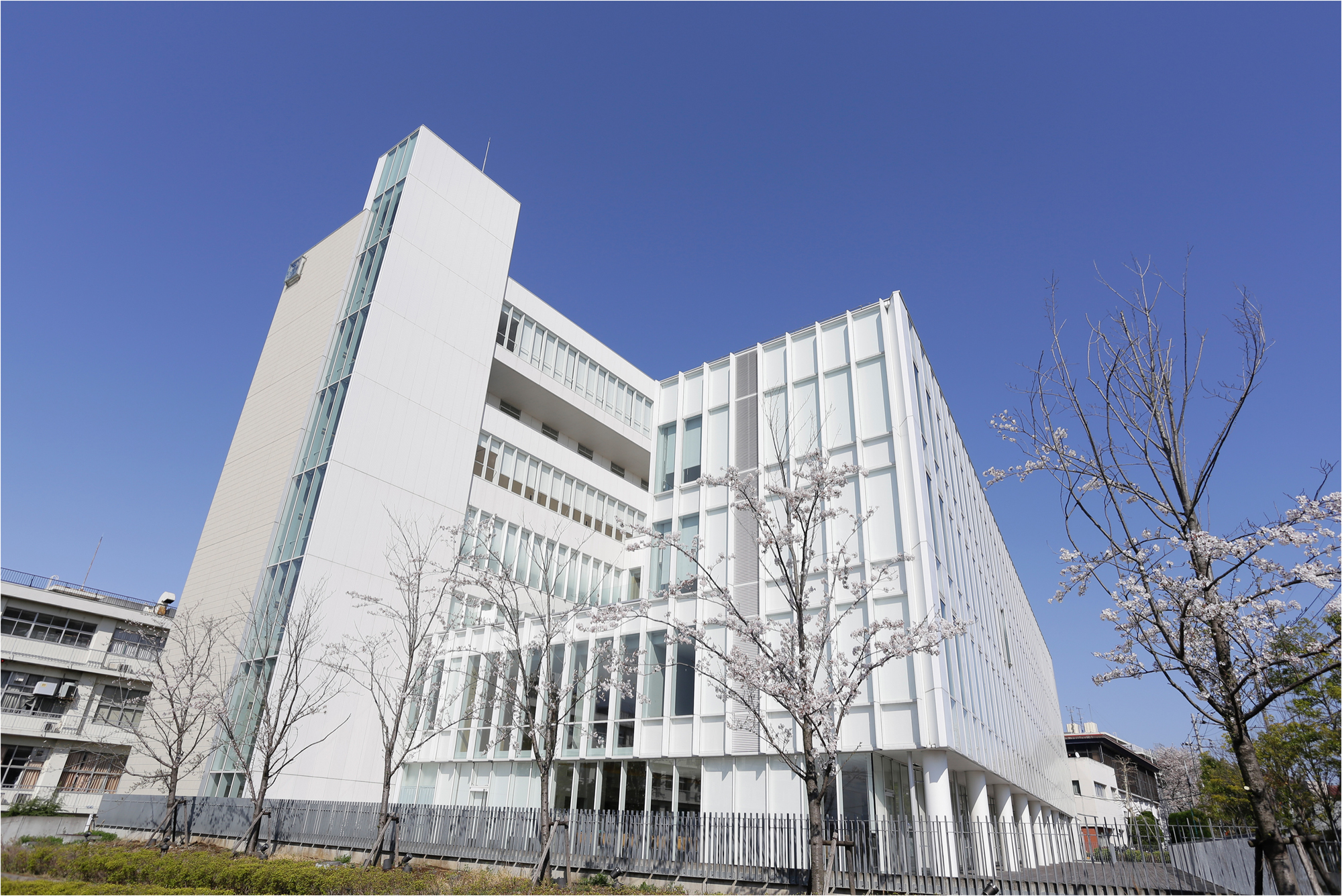 stmariannnauniv